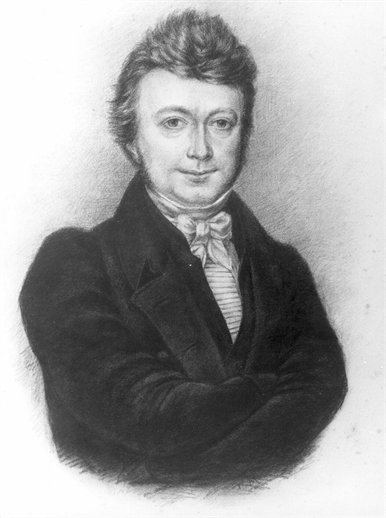 Tekening in zwart krijt. Afgebeeld is Nicolaas van der Monde, een Utrechtse boekhandelaar, uitgever en amateurhistoricus